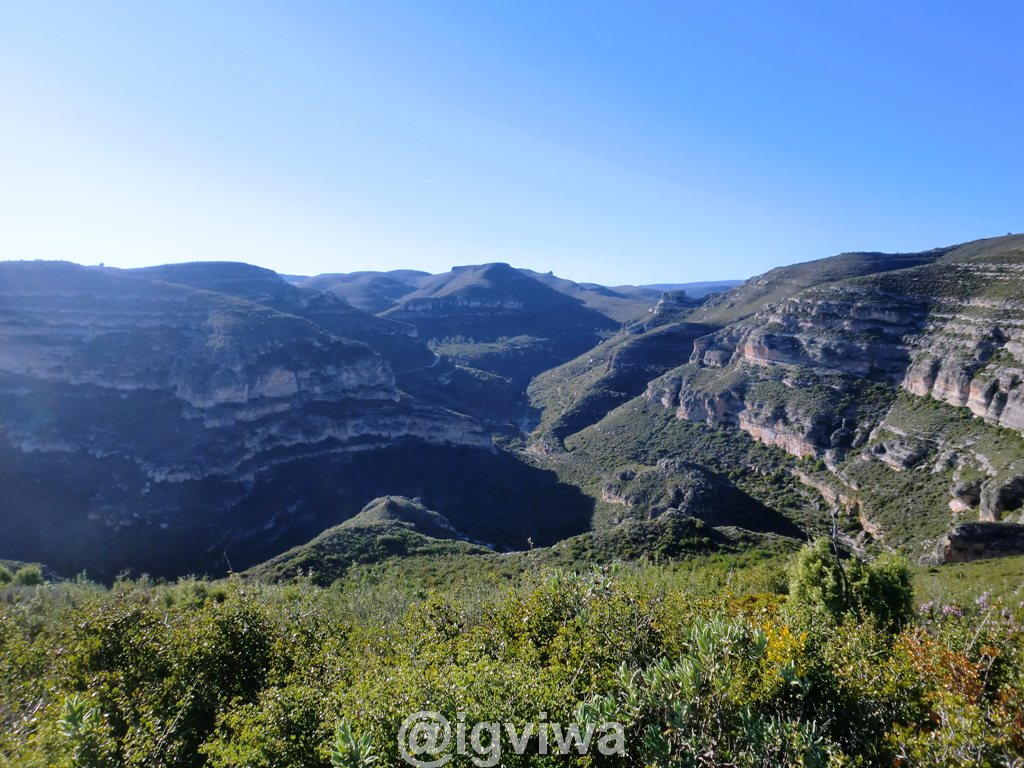 La sierra de Enguera